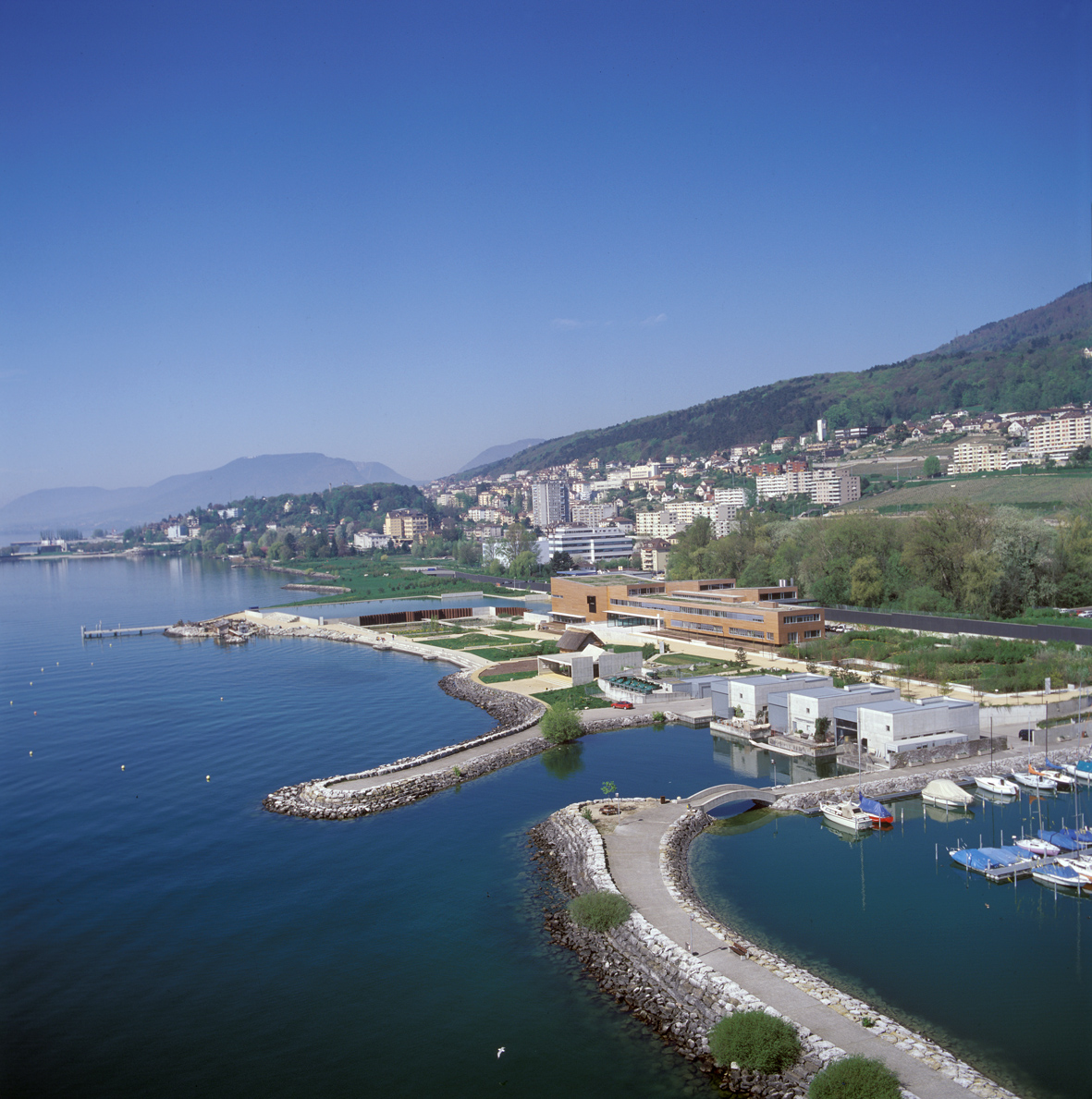 Photo d'Yves André tirée des Archives du Laténium, on y voit ce qu'est devenu le site de Hauterive-Champréveyres, ainsi que la baie.